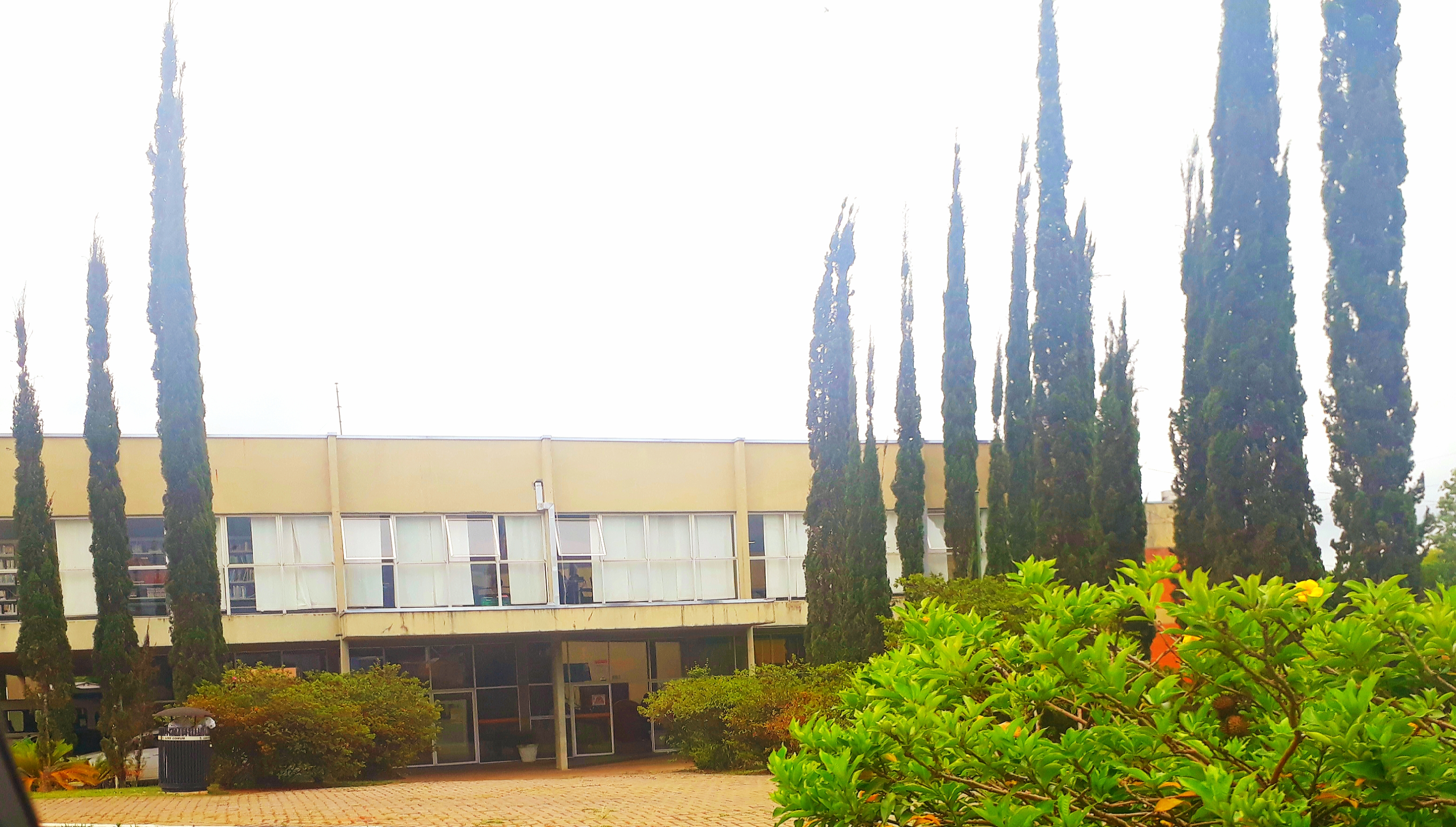 Centro Cultural Eloah Martins Quadrado (Casa da Cultura), em Telêmaco Borba, no Paraná.